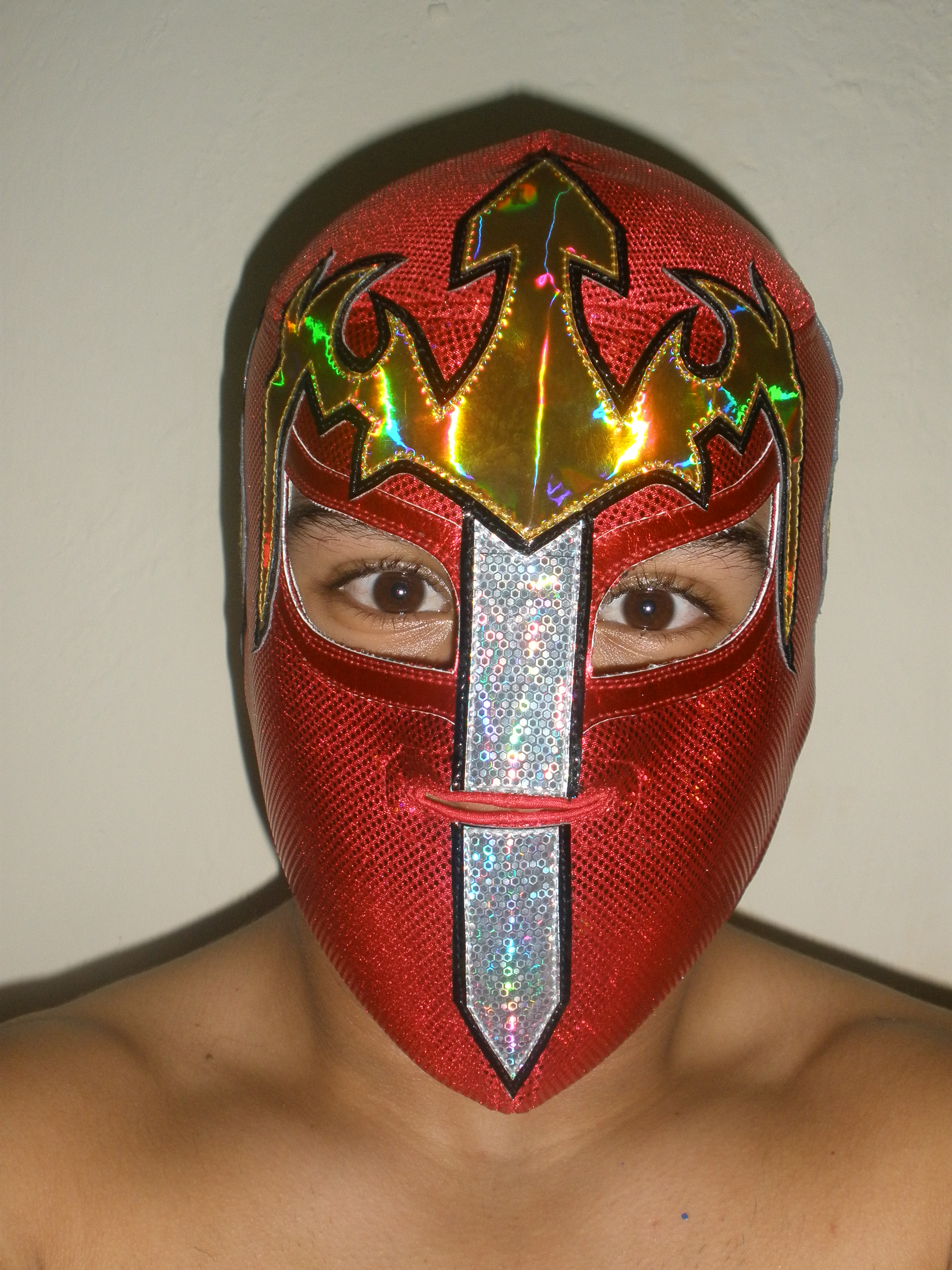 máscara de pequeño valiente